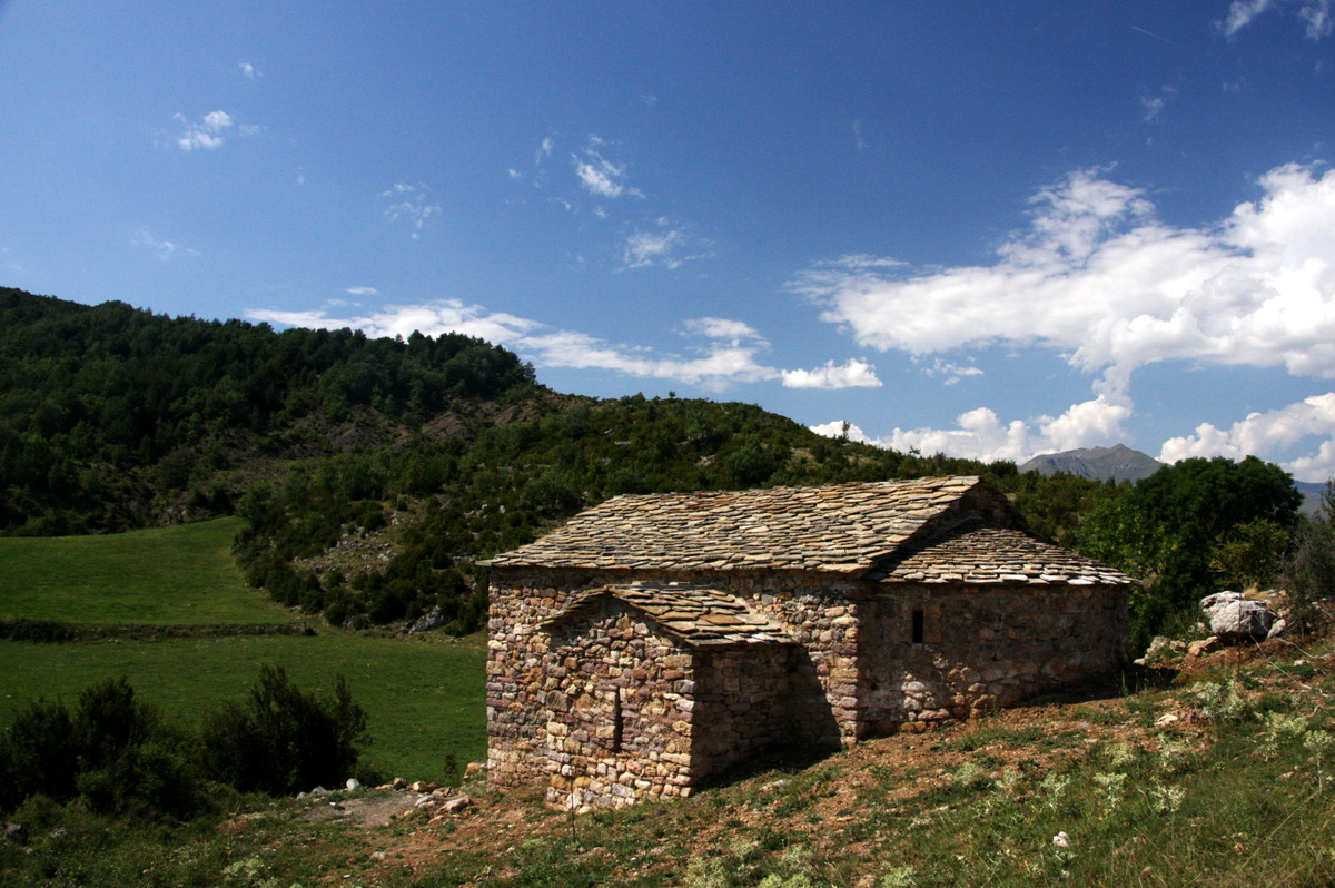 Ermita de Sant Roc a Bonansa (la Franja-Osca)